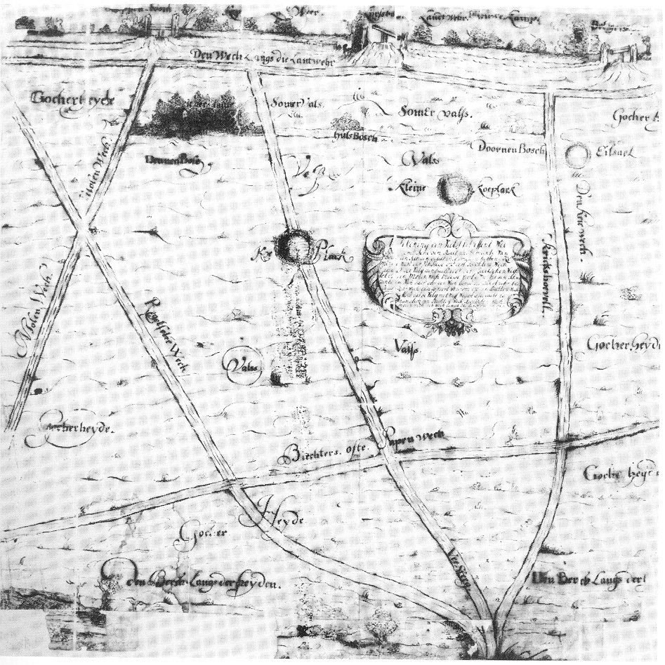 Karte der Gocher Heide im Jahr 1733 - Map of the Gocher Heide in the year 1733, Goch, Germany